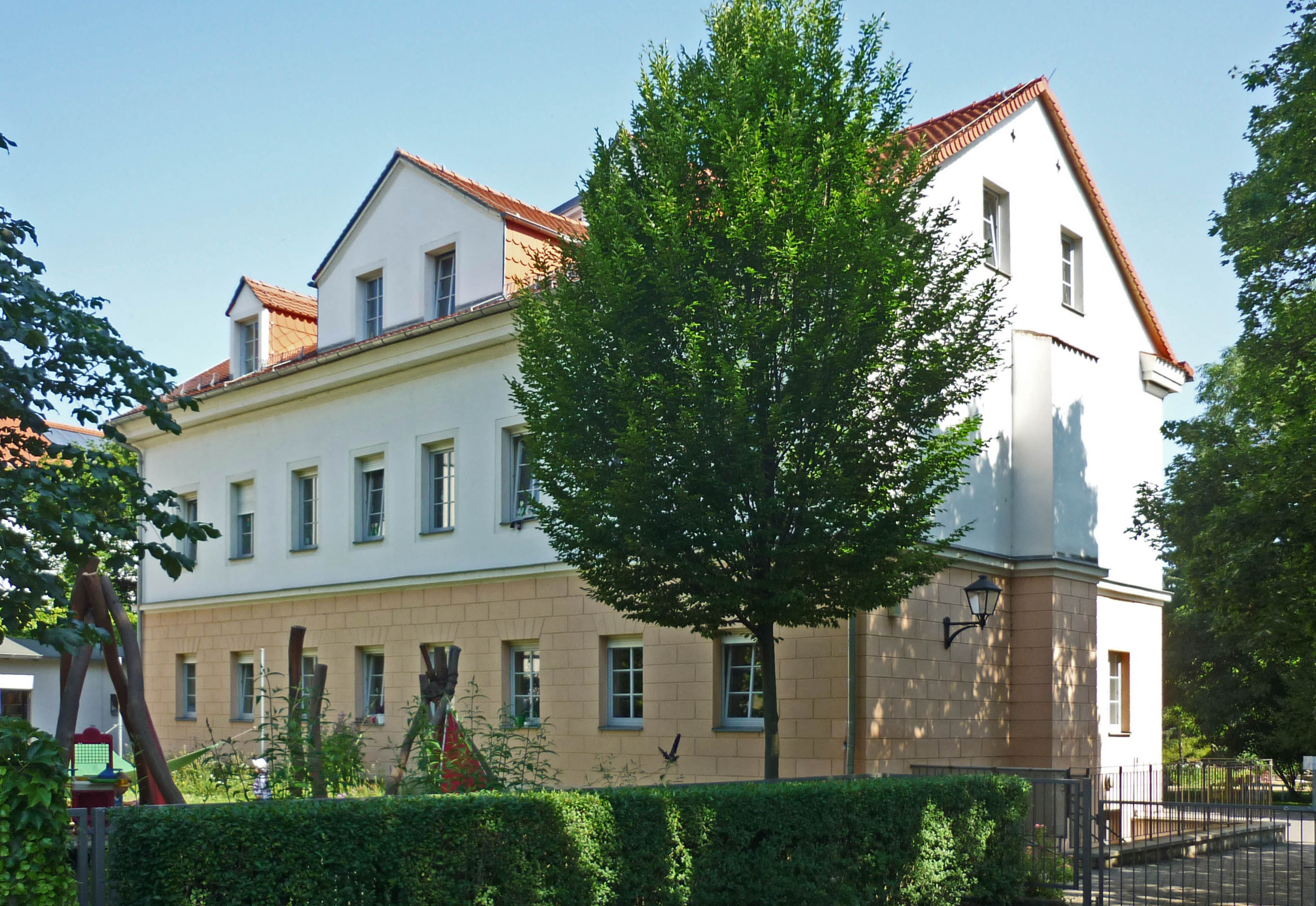 Friedrichstr. 46 in Dresden-Friedrichstadt